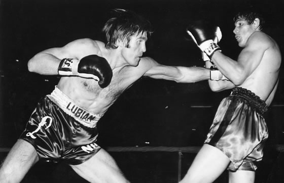 Nino Benvenuti vs Carlos Monzón at Palazzo dello Sport, Rome